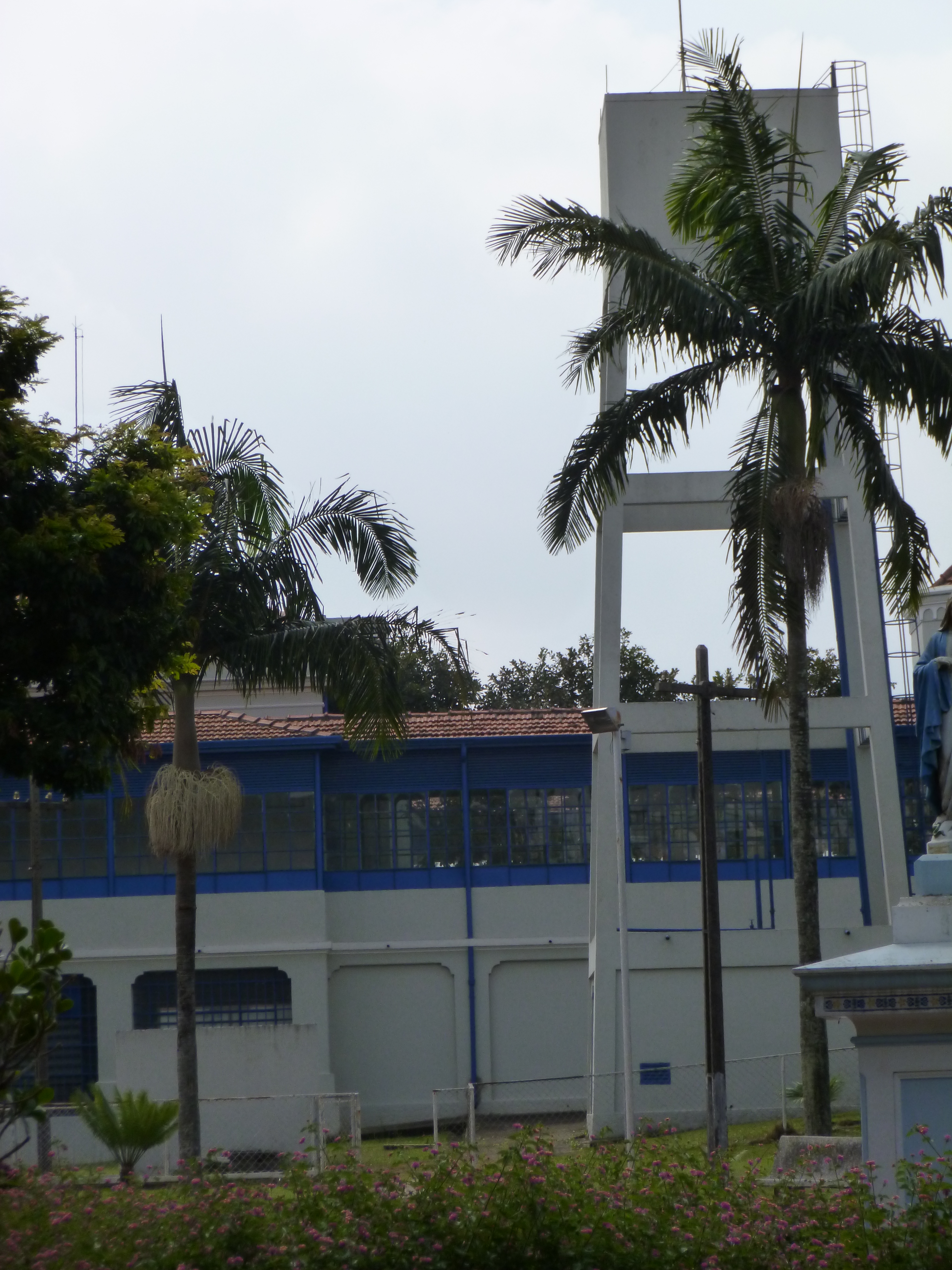 Visão do edifício principal da Unidade e da caixa d'água que o alimenta.